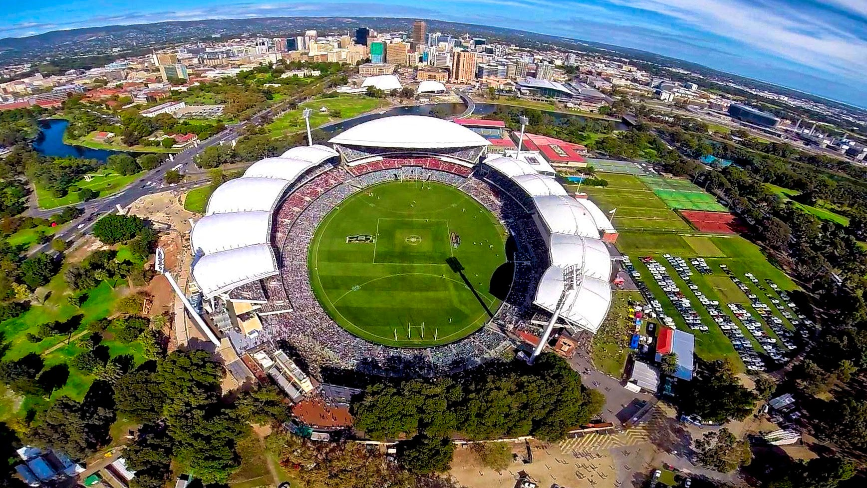 Adelaide Oval